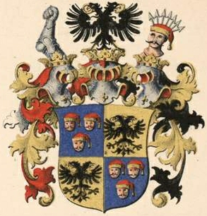 Belowi suguvõsa aadlivapp